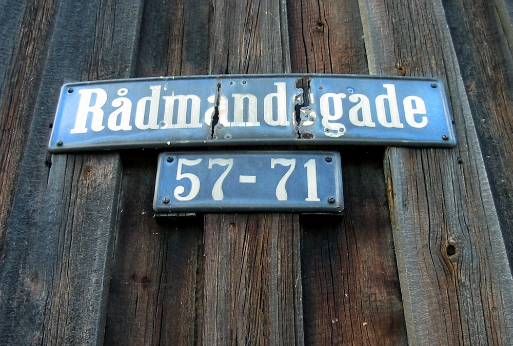 Gadeskilt fra Rådmandsgade nr. 57-71 i København